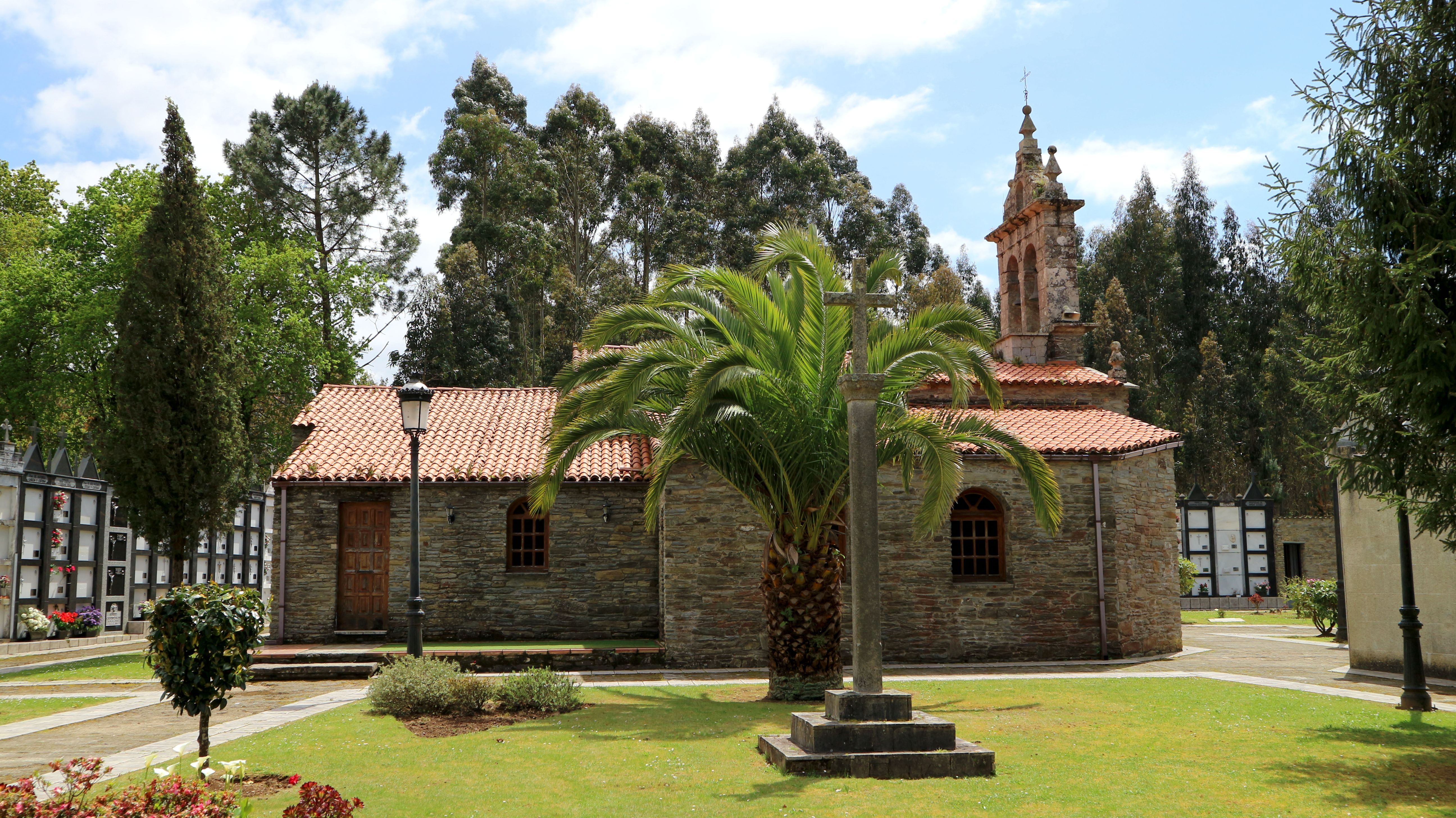 Igrexa de San Salvador de Viós. En Viós, Abegondo.